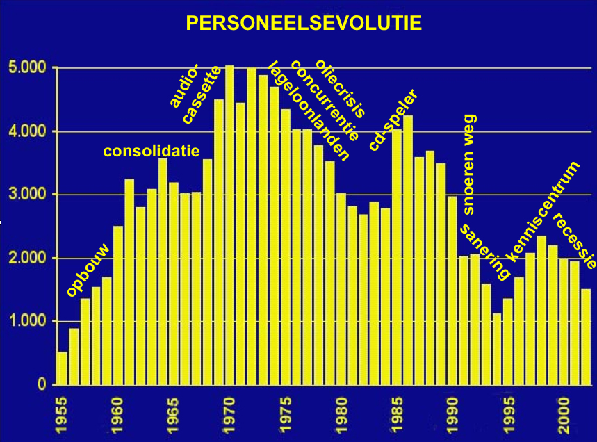 Grafiek van de personeelsevolutie Philips in Hasselt